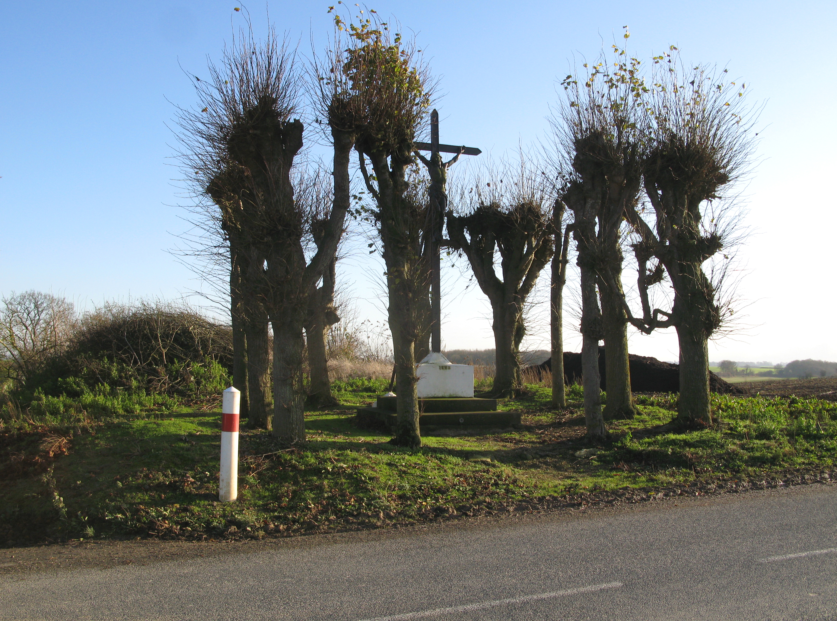 Hancourt (Somme, France) - Le calvaire, dressé à l'entrée du village, en venant de Vraignes-en-Vermandois. .